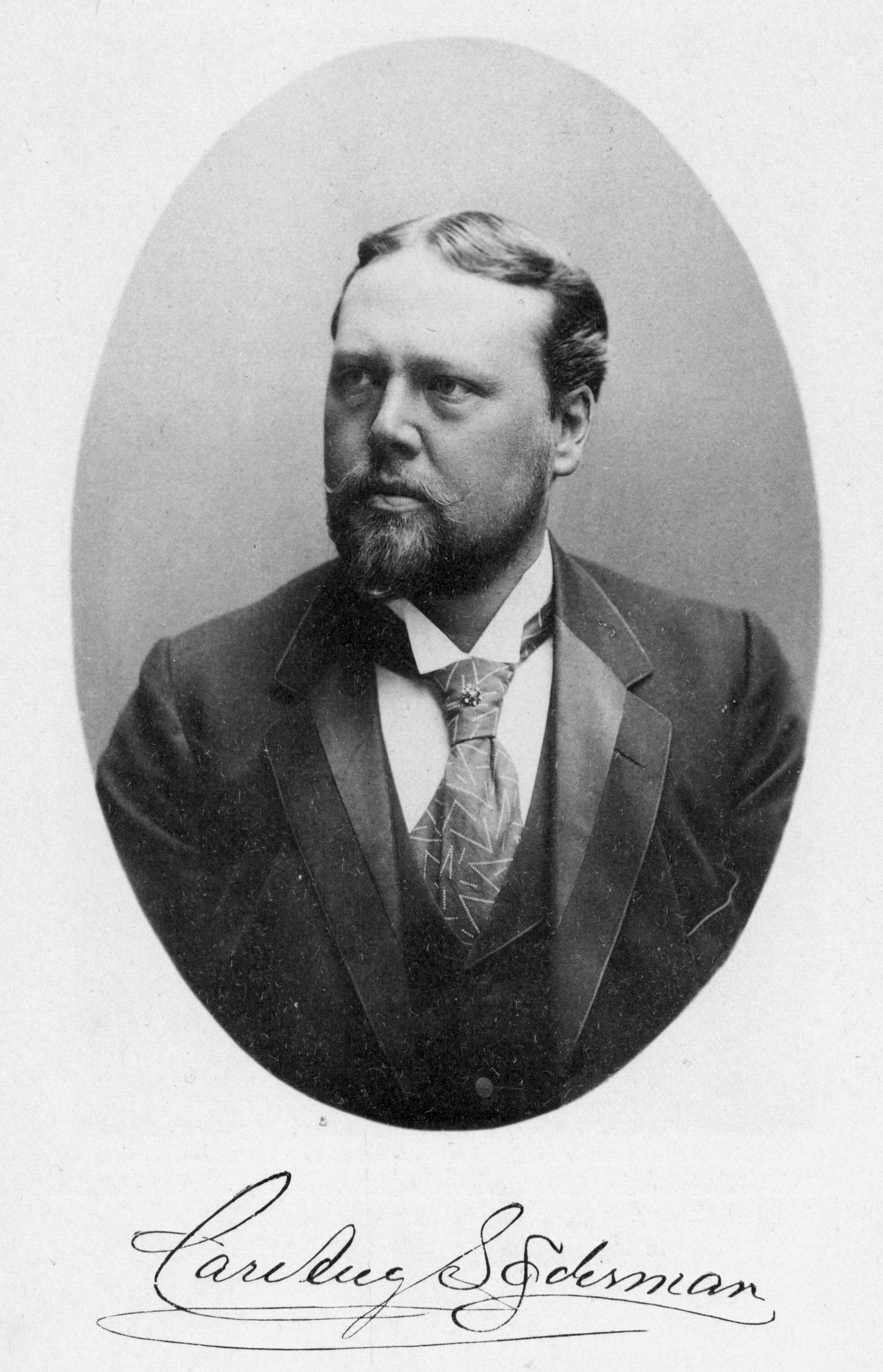 Carl August Söderman (1860-1916)